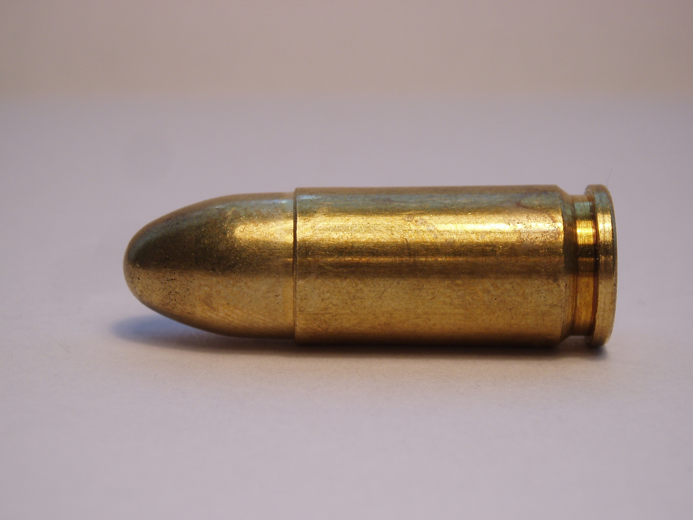 9 mm Luger pistol cartrdige. FMJ bullet. Manufacturer: Sellier & Bellot.